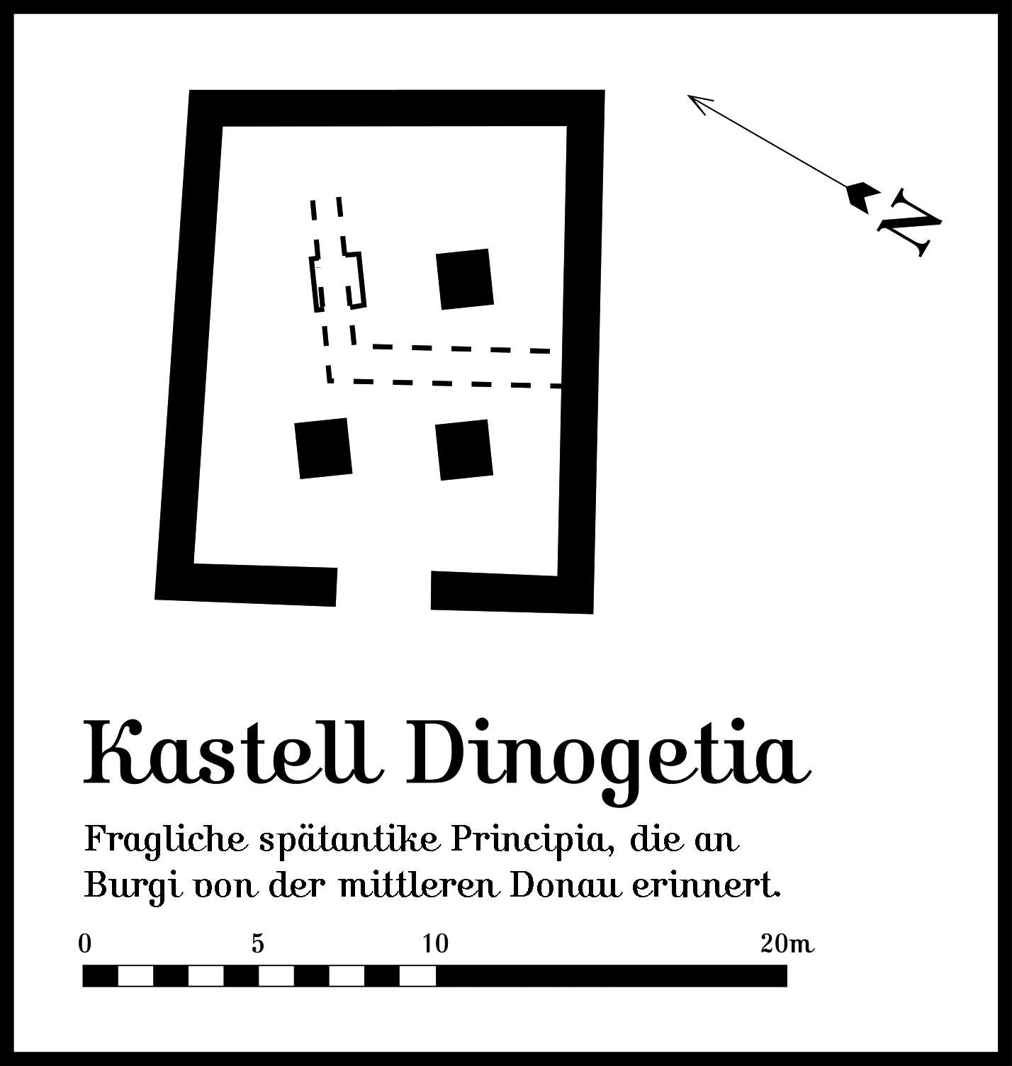 Die fragliche Principia des spätantiken Kastells Dinogetia, Rumänien, die vom Ende 3./Anfang 4. Jahrhundert n. Chr. stammen soll. Sie erinnert an wesentlich später entstandende Burgi von der mittleren Donau. Hergestellt am Macintosh unter Macromedia Freehand MX; abgespeichert für Wikipedia unter Adobe Photoshop CS 2.